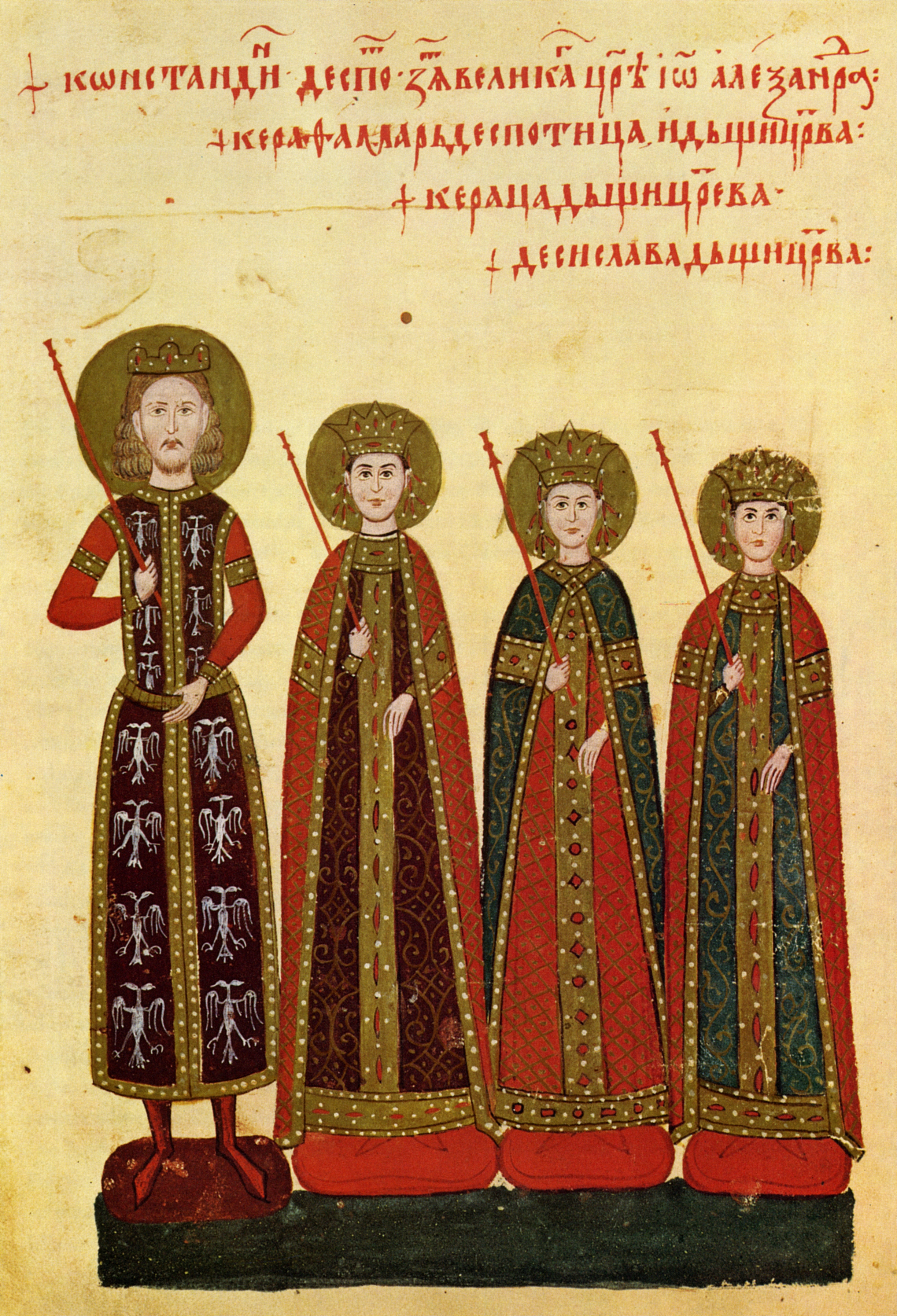 Четвероевангелие на цар Иван Александър, л. 2 Миниатюра: Деспот Константин (Константин Драгаш ?), Кера Тамара, Кераца и Десислава